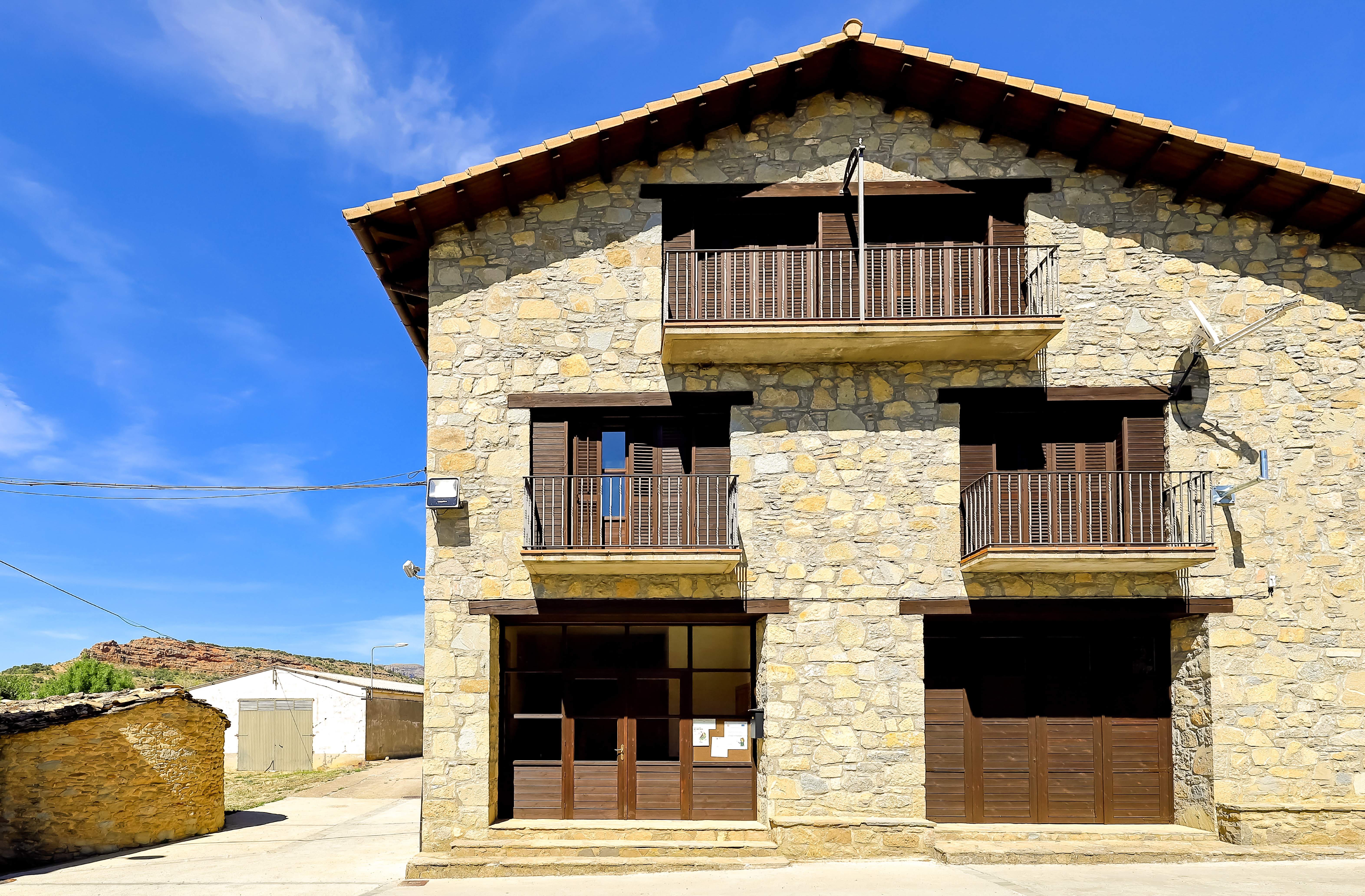 Monesma y Cajigar es un municipio de la comarca de Ribagorza en la provincia de Huesca.